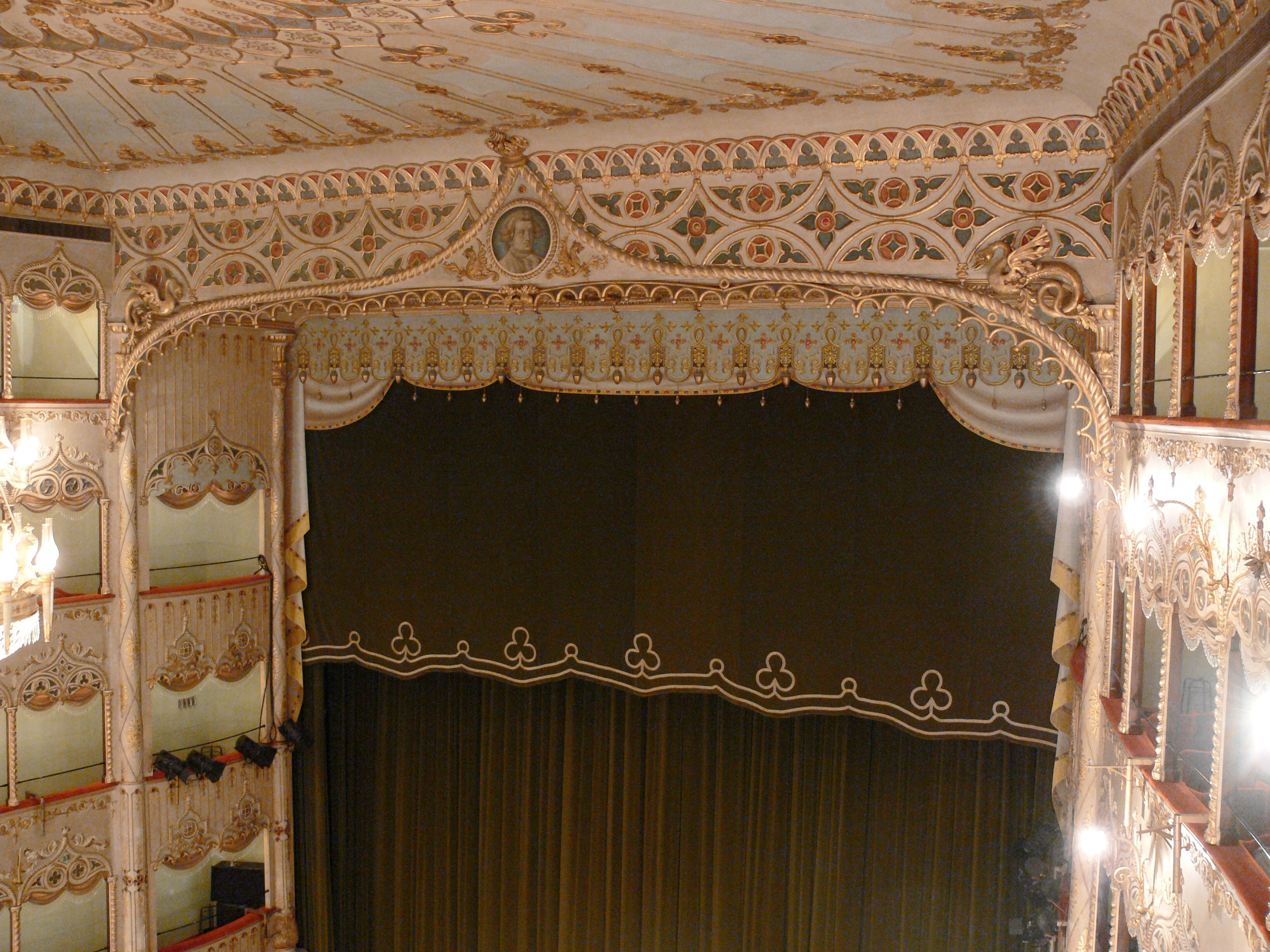 Proscenium arch Teatro stabile del Veneto "Carlo Goldoni", Venezia